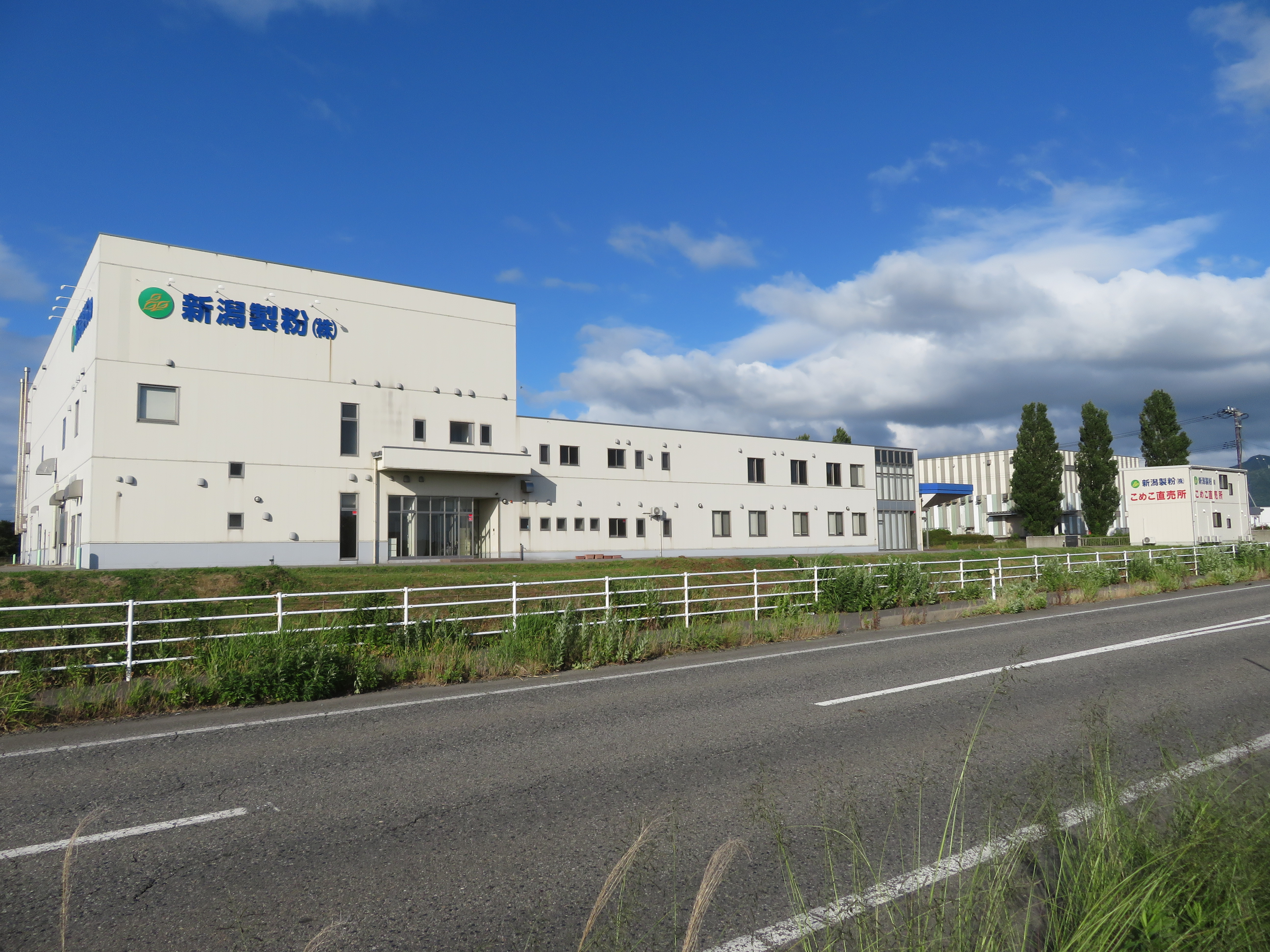 新潟県胎内市に所在する新潟製粉株式会社第二工場 Canon PowerShot SX720 HS